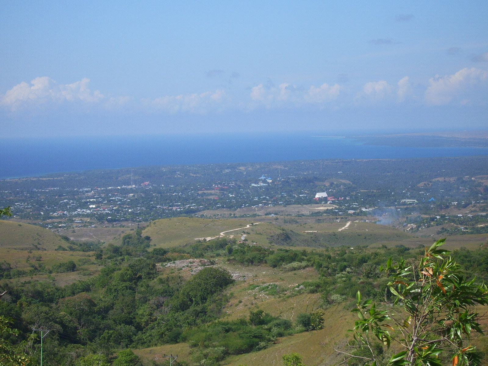 View on Waingapu, Sumba, Indonesia